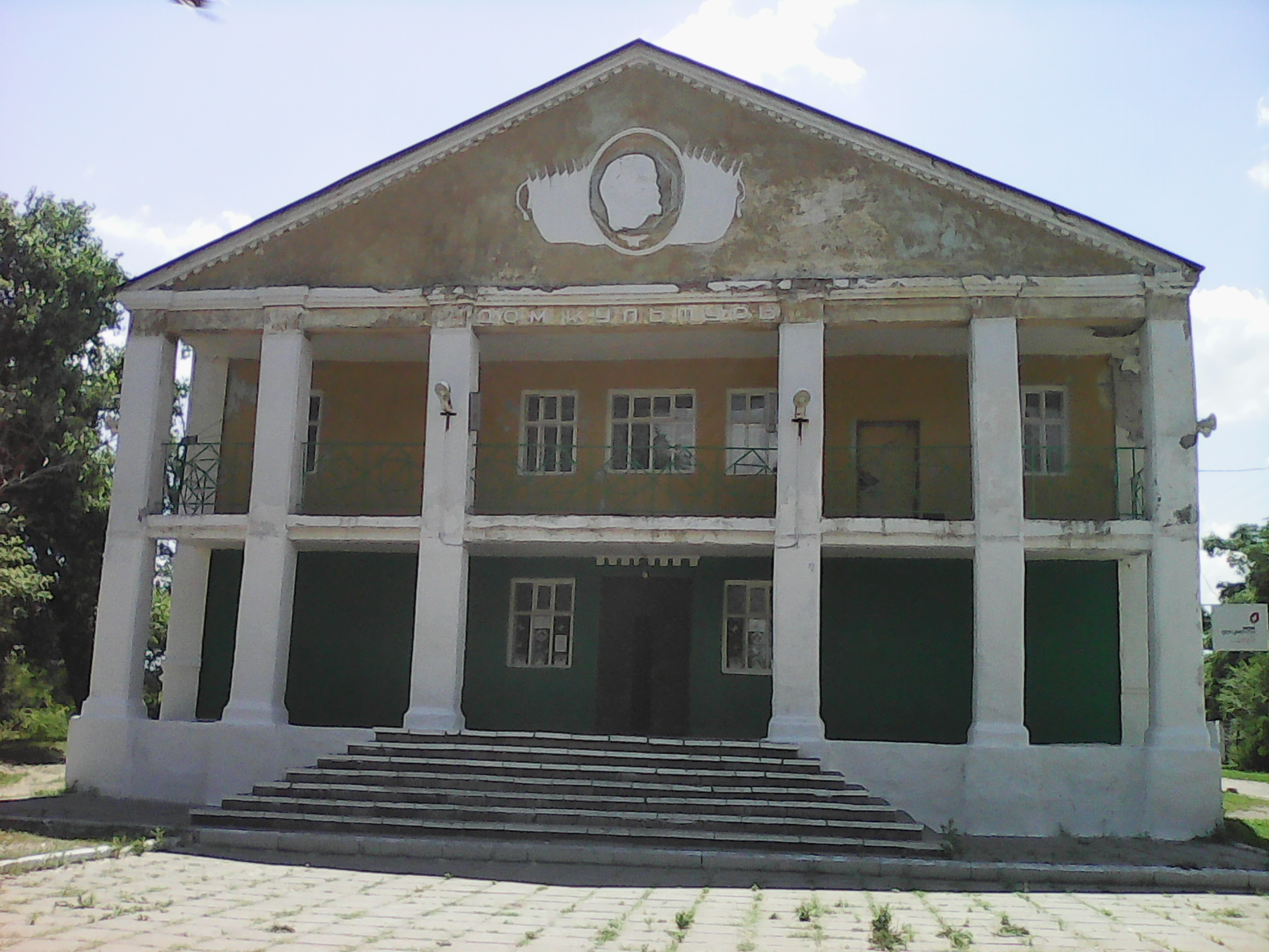 Дом культуры в селе Александровка Донская